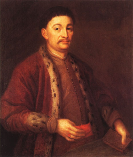 Jeremi Michał Wiśniowiecki